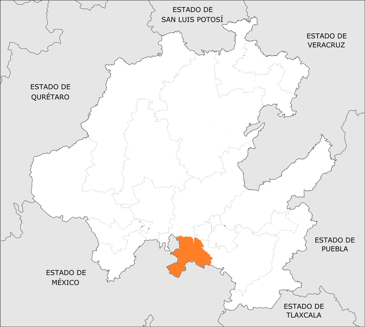 Distrito Electoral Local de Hidalgo 16